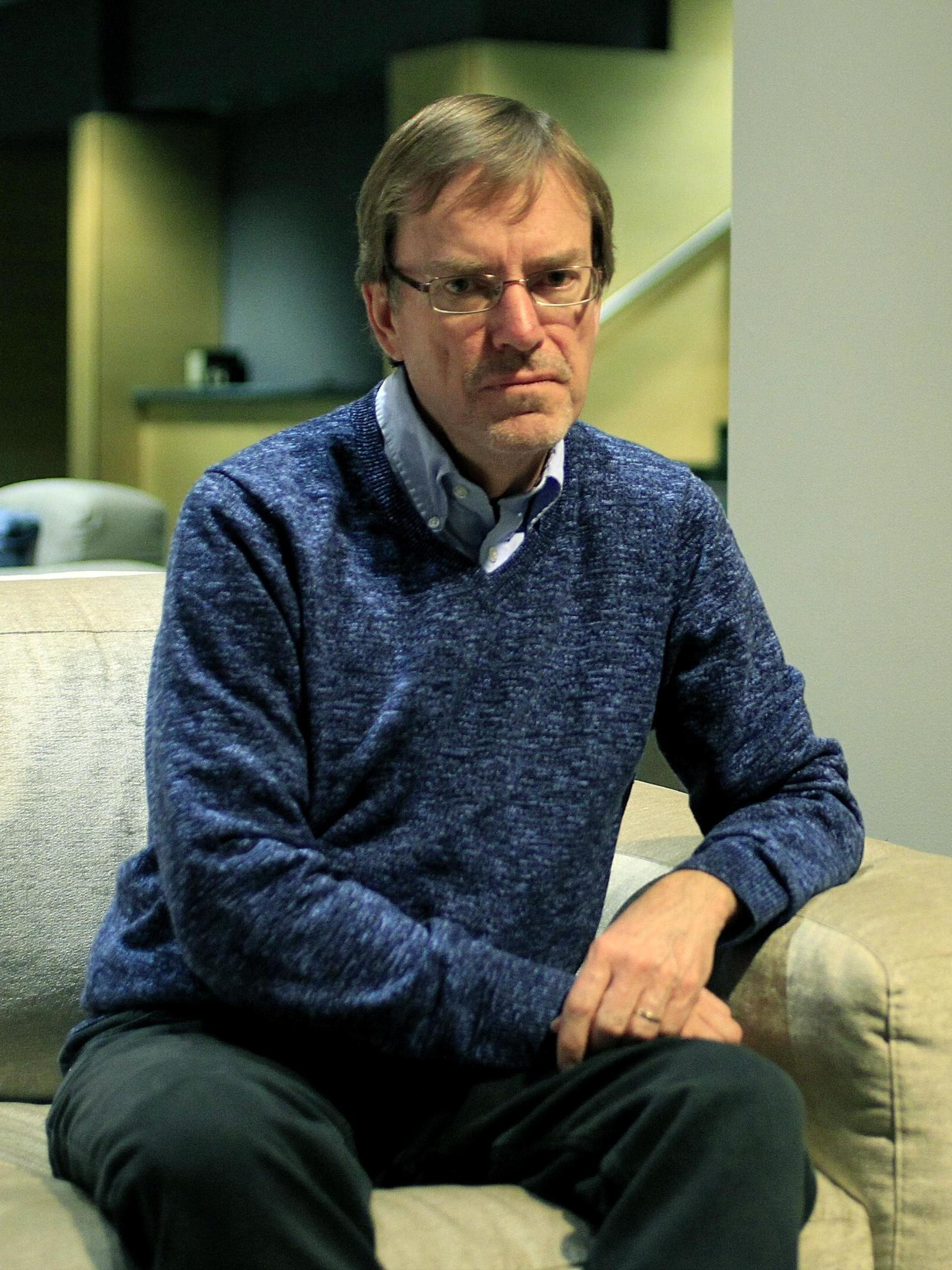 El economista estadounidense Randall Wray es uno de los teóricos del trabajo garantizado, la propuesta que ha hecho suya IU. Esta fórmula beneficiaría “a los trabajadores que han perdido su empleo en el sector privado”, por lo que, en su opinión, no sería inflacionaria. Cree que “España fue un ejemplo extremo” de acumulación de deuda y gasto excesivo por parte del sector privado